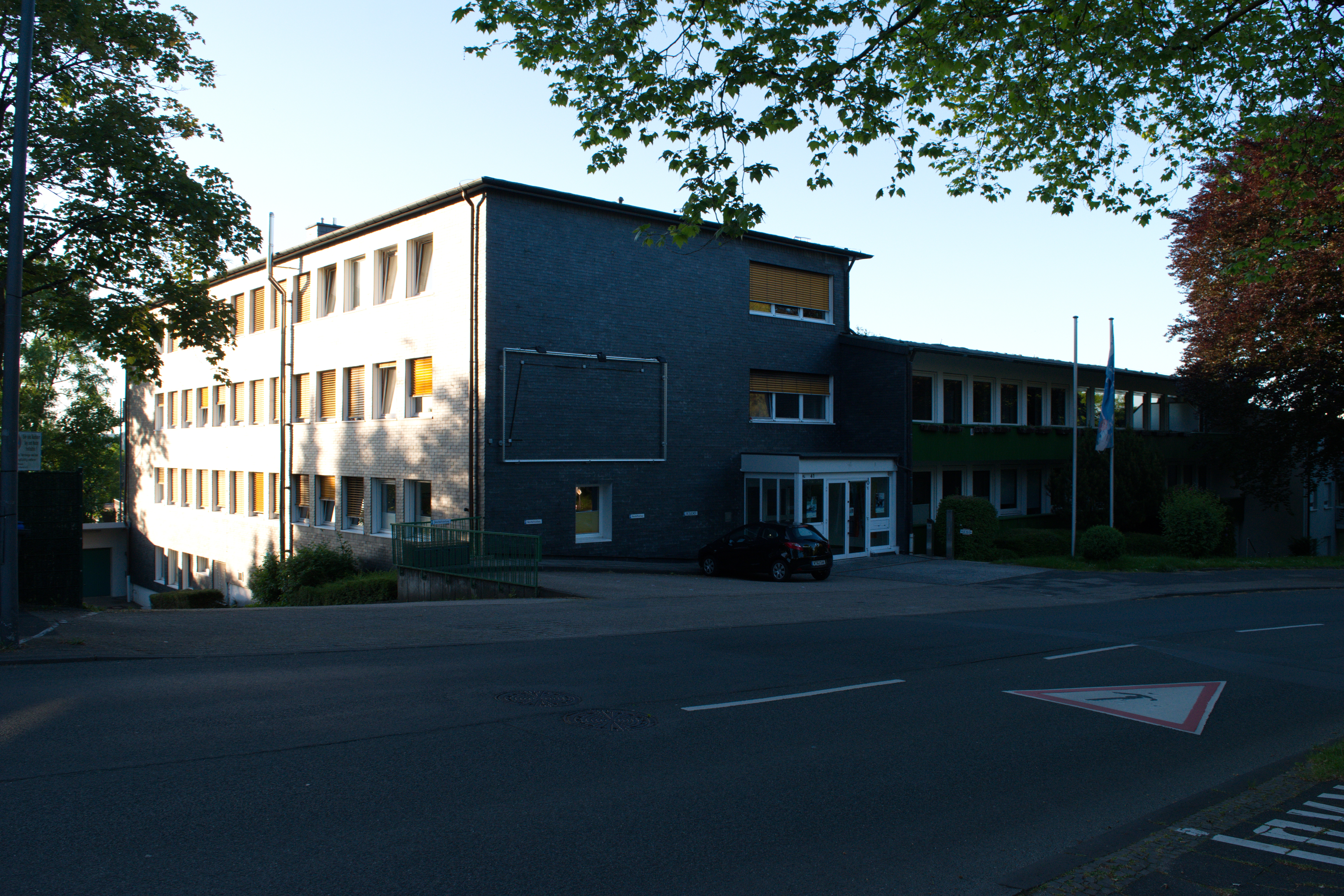 Schubertstraße, Wuppertal